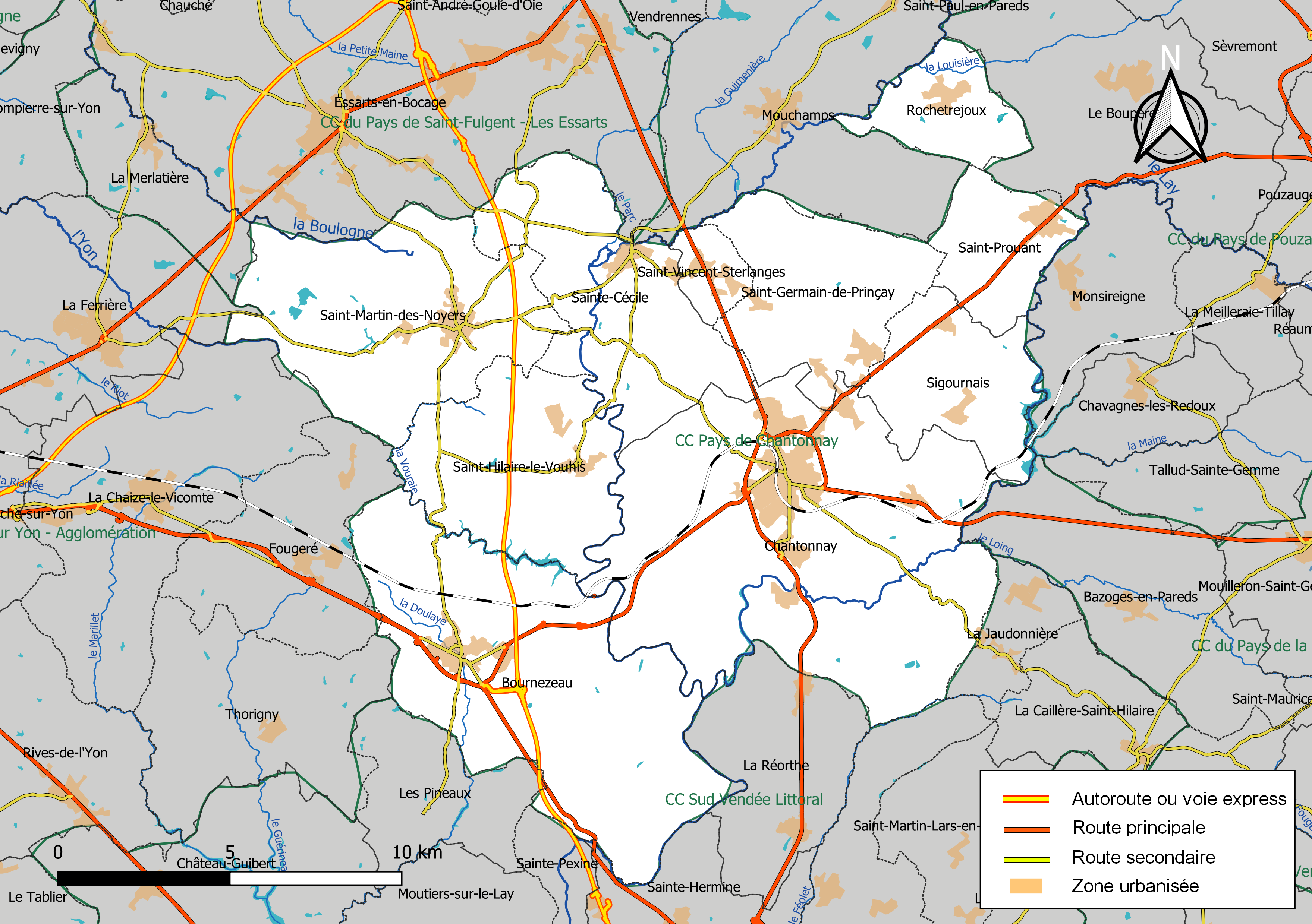 Carte géographique de la Communauté de communes du Pays-de-Chantonnay, département de la Vendée, France. Composition au 1er janvier 2019.